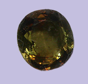 Andalousite taillée,montrant le pléochroïsme rouge et vert./Cut Andalusite,showing the pléochroïsm.